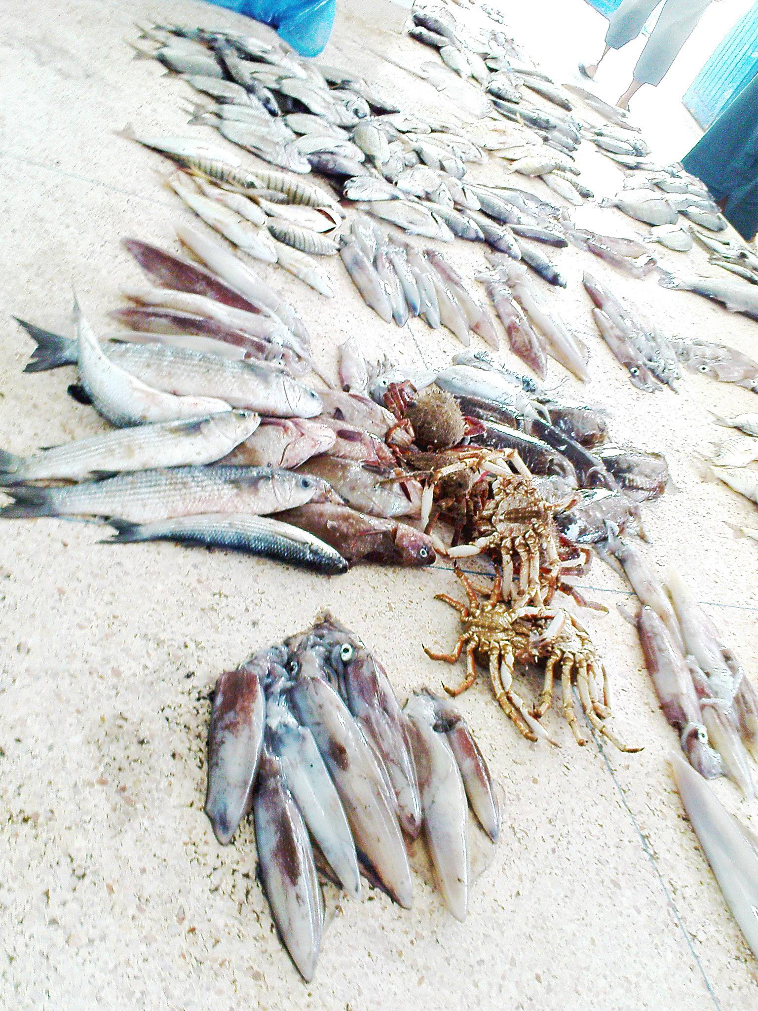 Tašlḥiyt/ⵜⴰⵛⵍⵃⵉⵜ: Souq islman n taghazout